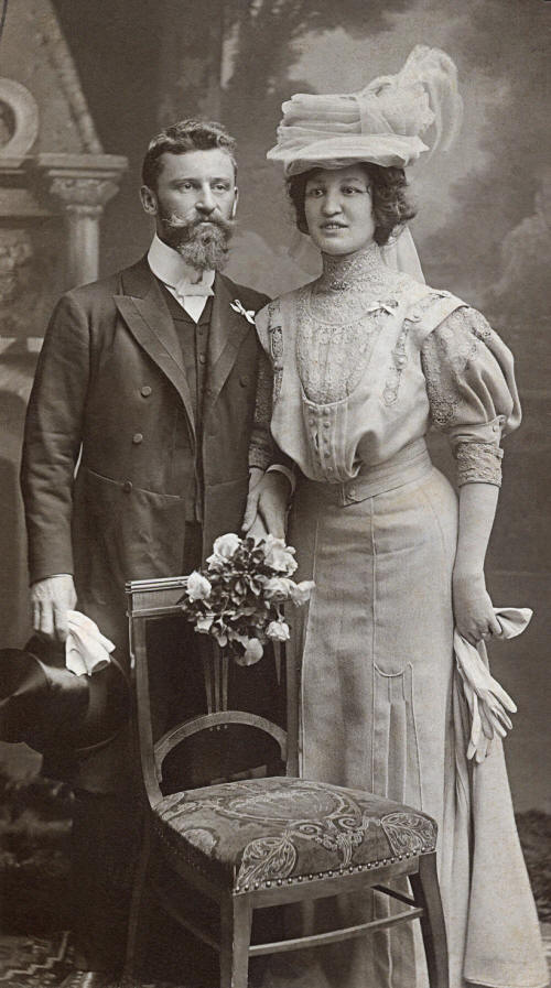 Milan Havlíček a Františka Schnirchová